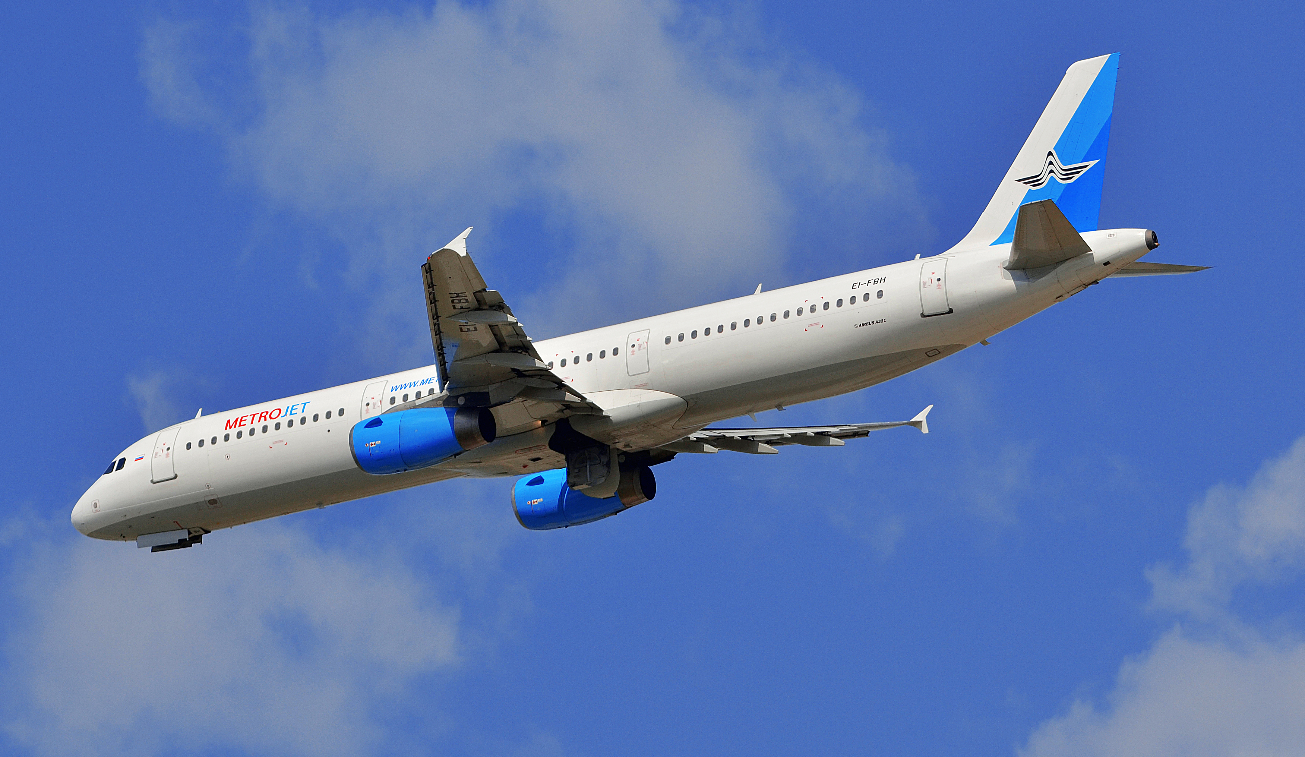 Можно увидеть здесь : You can see here